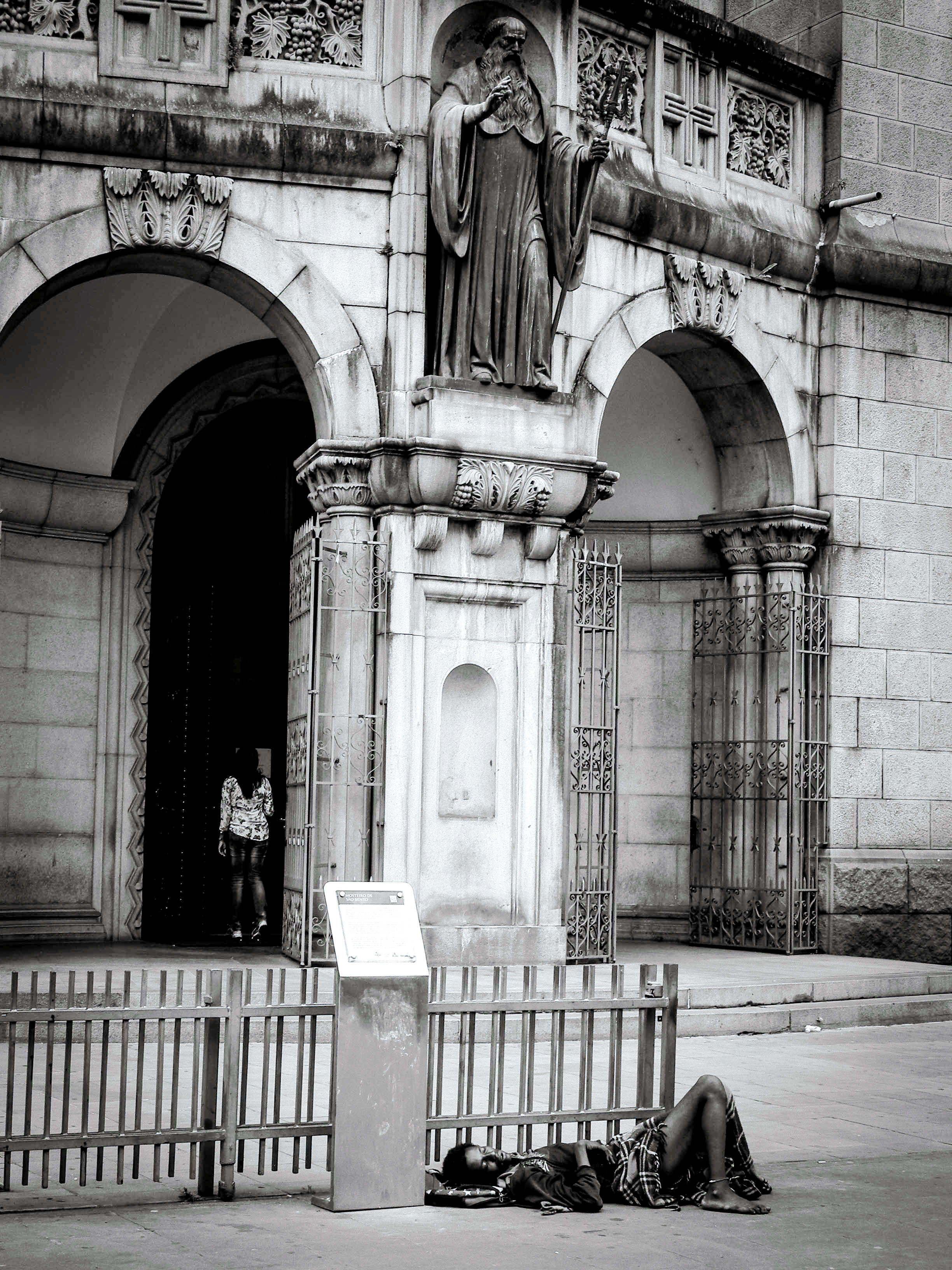 Pobreza em São Paulo